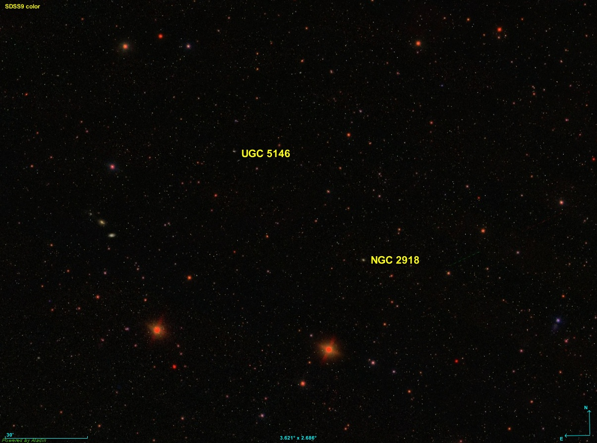 Image créée à l'aide du logiciel Aladin Sky Atlas du Centre de Données astronomiques de Strasbourg et des données publiques en format FIT de SDSS (Sloan Digital Sky Survey).